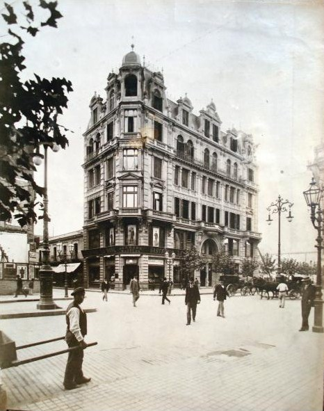 Edificio del arquitecto Edwin Merry, ca. año 1890. Fue reformado hacia 1910 como anexo de la tienda Gath y Chaves. Actualmente es un edificio de oficinas y en la planta baja funciona la confitería London City. Avenida de Mayo esquina Perú.